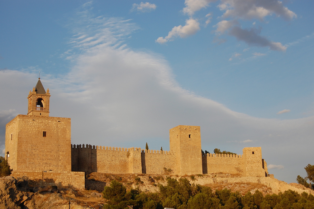 Alcazaba de Antequera, Málaga, España.